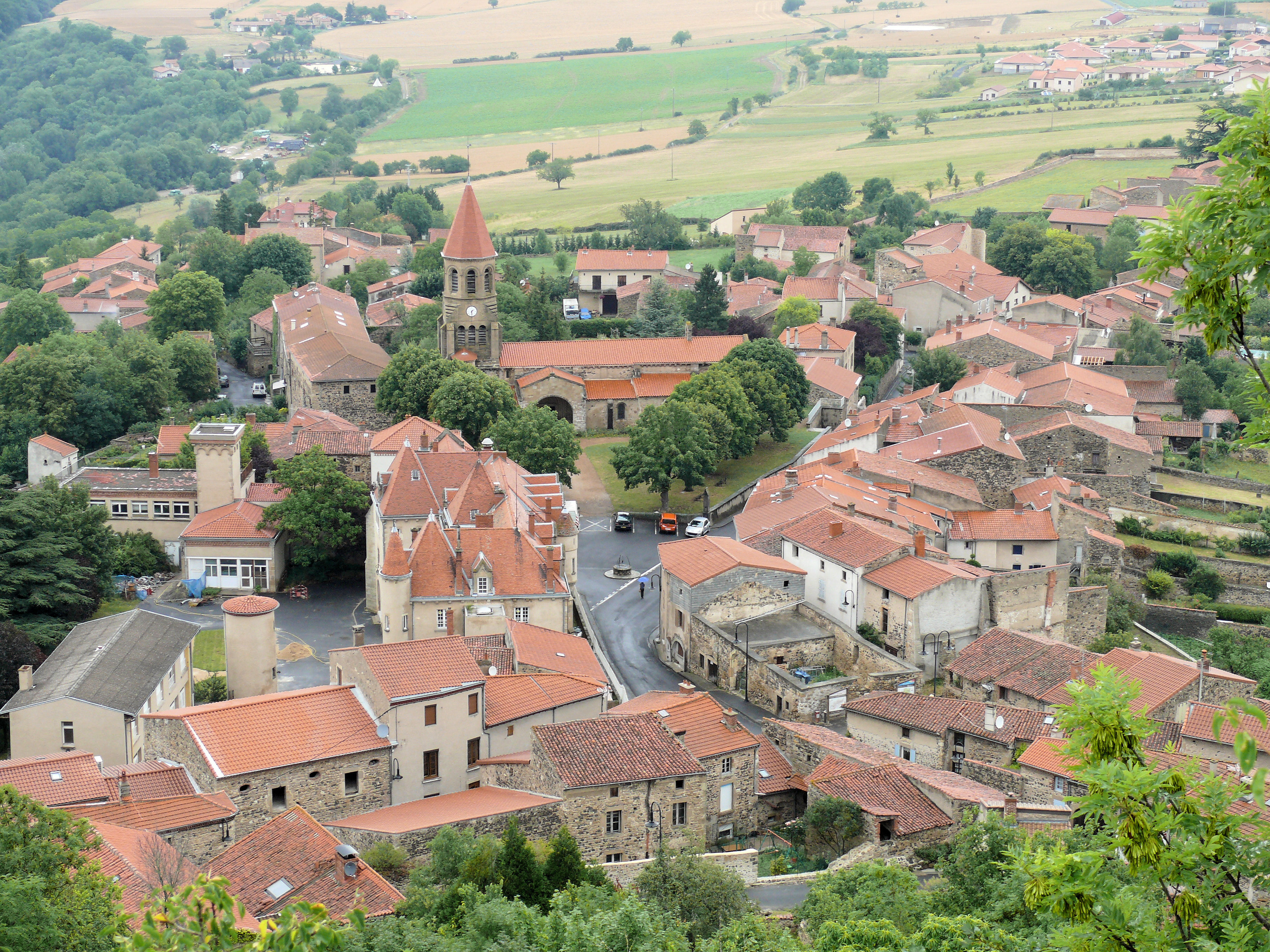 Nonette